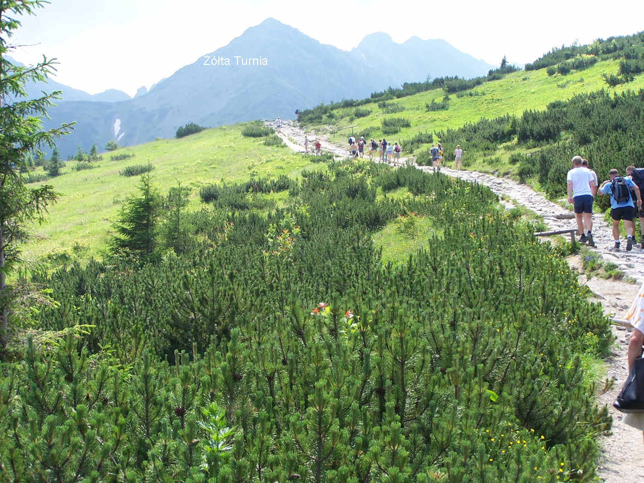 Królowa Równia (Tatra Mountains)